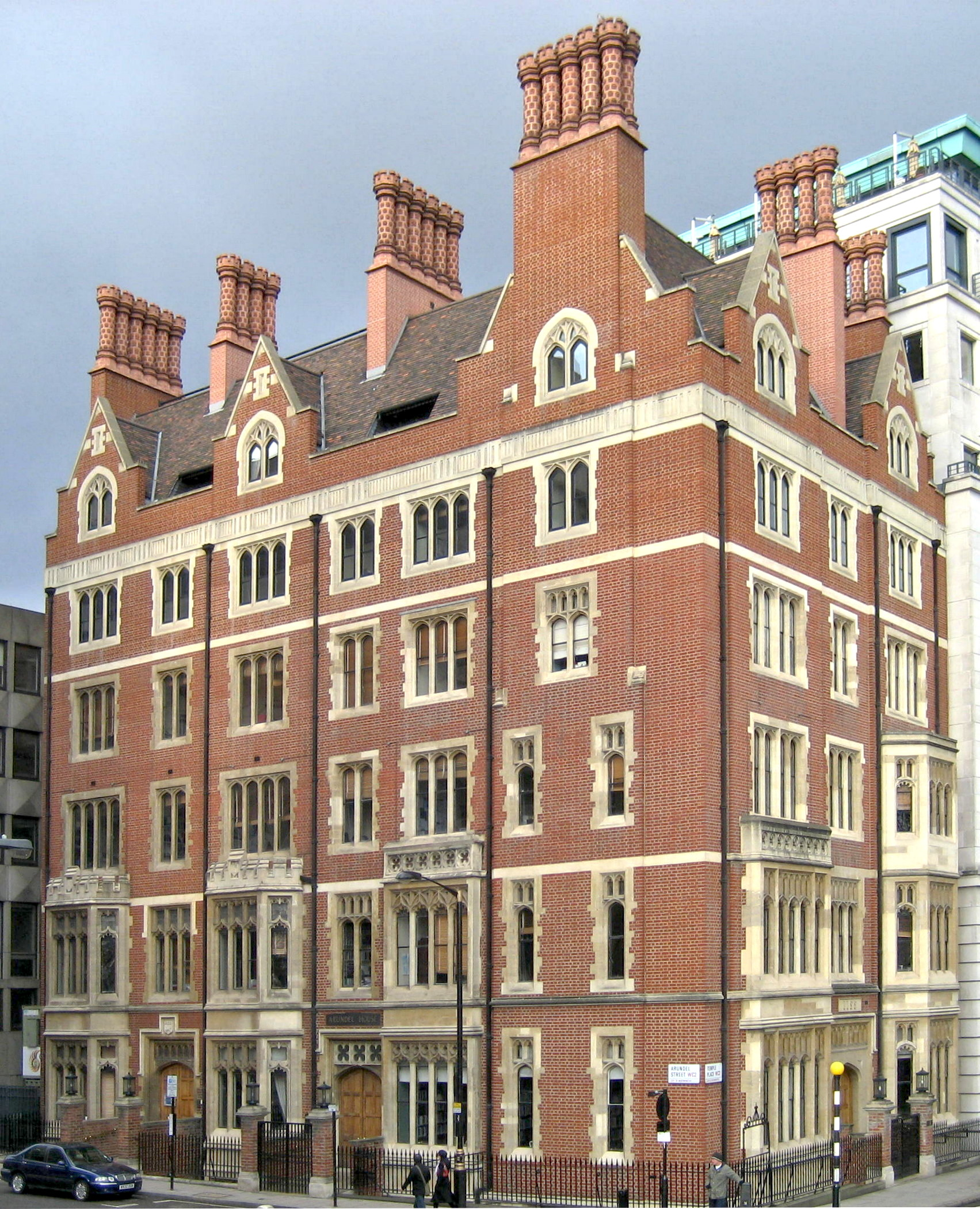 Arundel House, central London